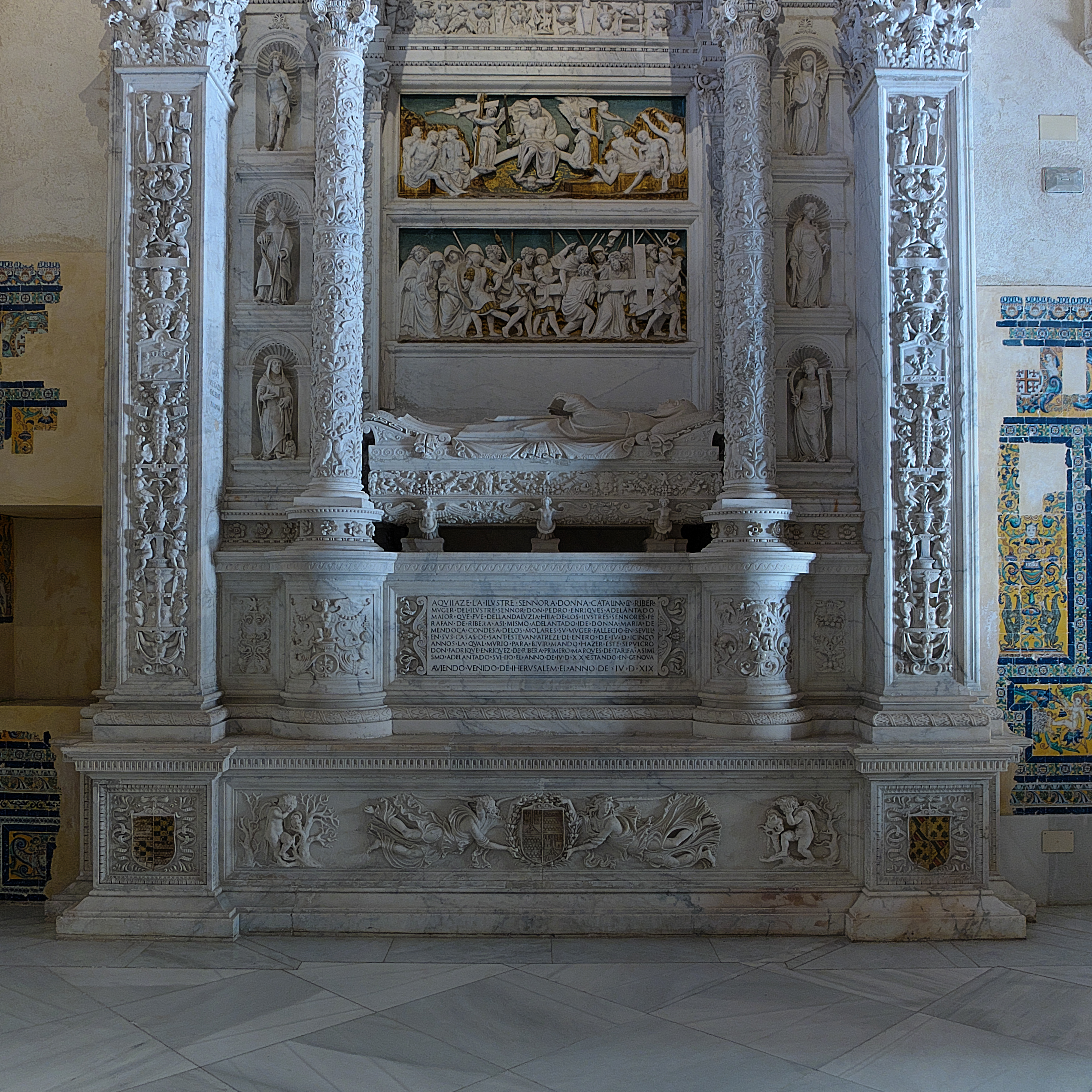 Cartuja de Santa María de las Cuevas (Sevilla). Vista parcial del sepulcro. Fadrique Enríquez de Ribera, primer Marqués de Tarifa, elige para la sepultura de su madre, doña Catalina de Ribera, la nueva escultura lombarda (1521). Pace Gazini, sobrino y discípulo de Antonio della Porta, transforma el concepto de la muerte a través de la mitología clásica y el humanismo cristiano. Es el arte renacentista.